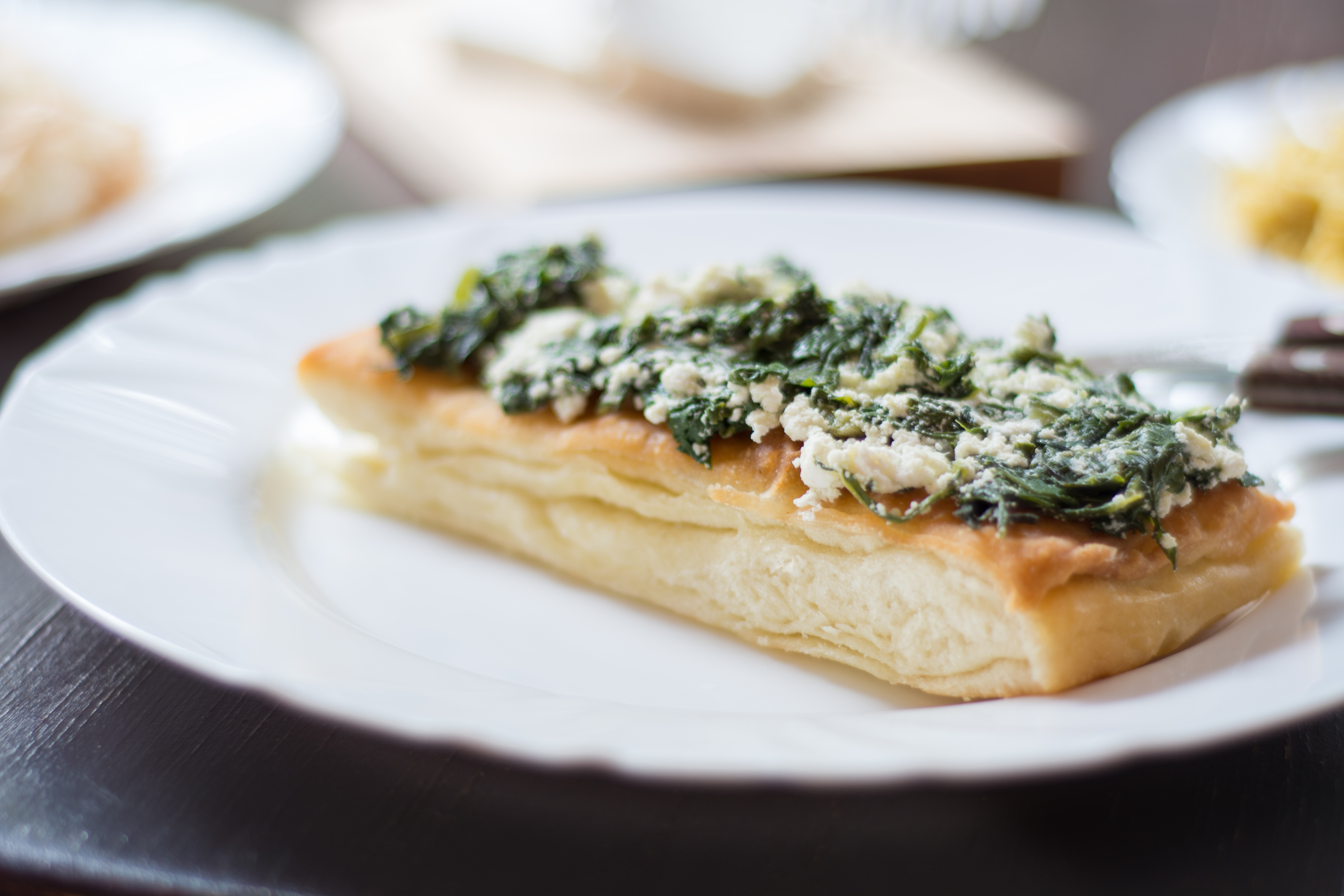 Традиционална реканска пита со спанаќ подготвена во ресторанот Кораб Трница во с.Трница, Општина Маврово и Ростуша